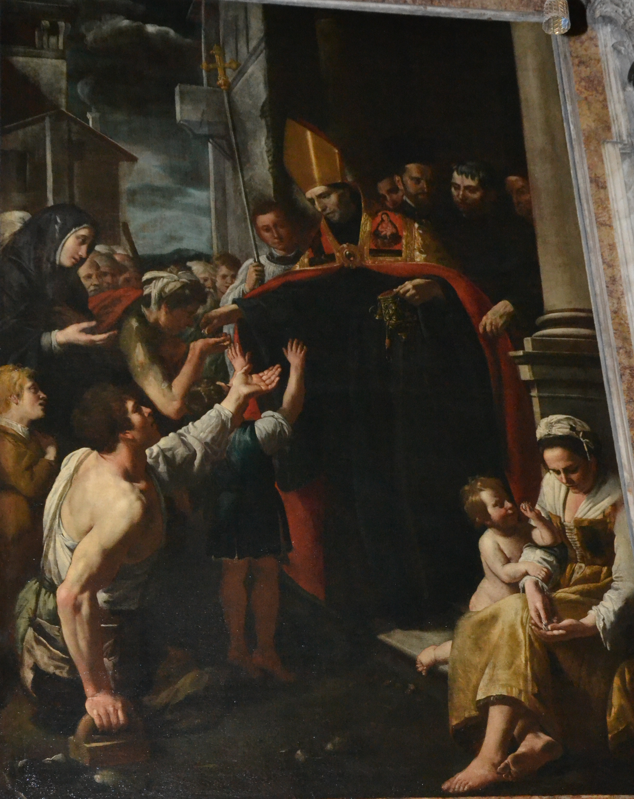 tela di Domenico Fiasella (San Tommaso di Villanova distribuisce i beni ai poveri), Chiesa della Consolazione (Genova)